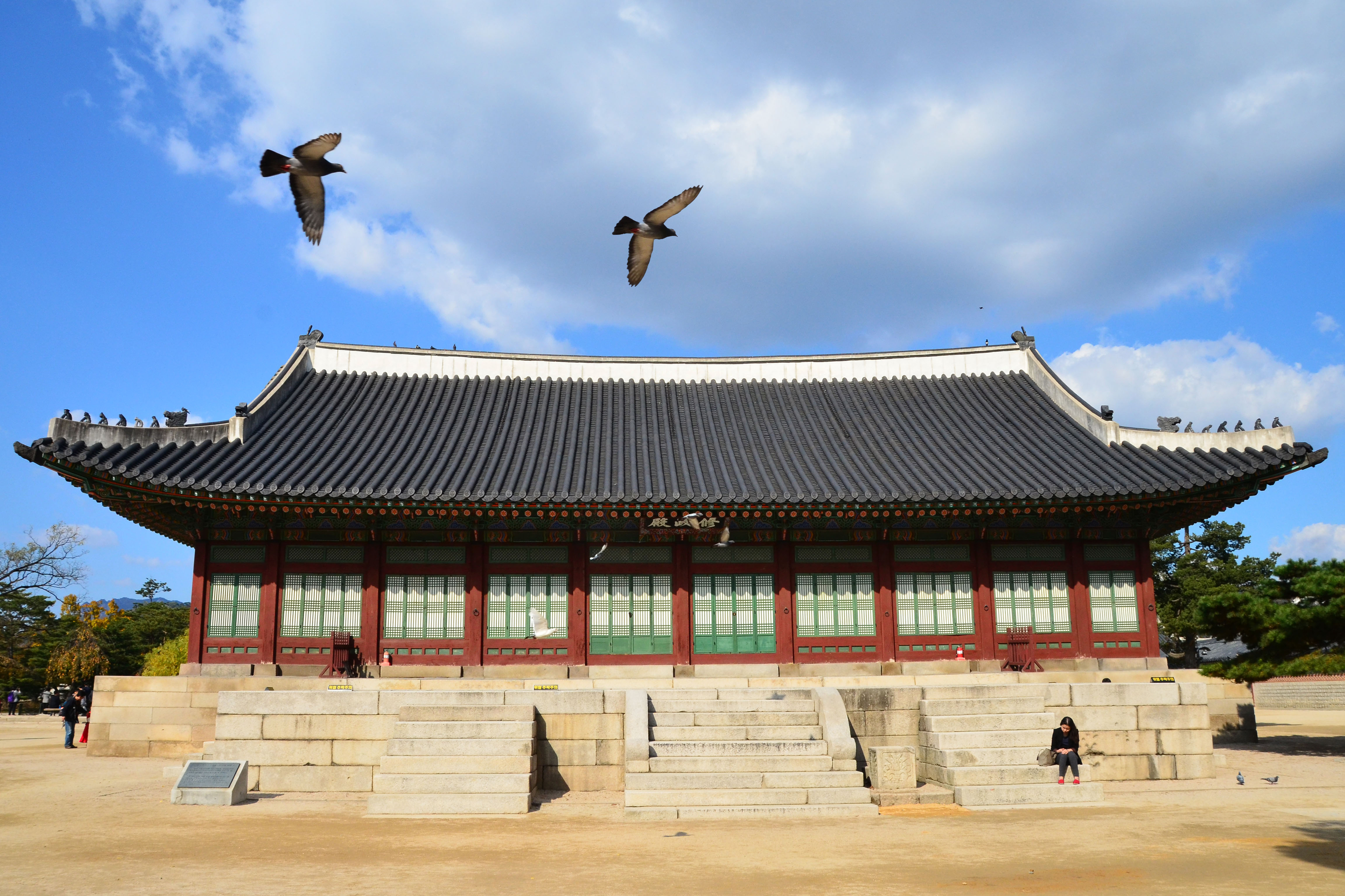 세종때 집현전으로 쓰이던 수정전입니다.